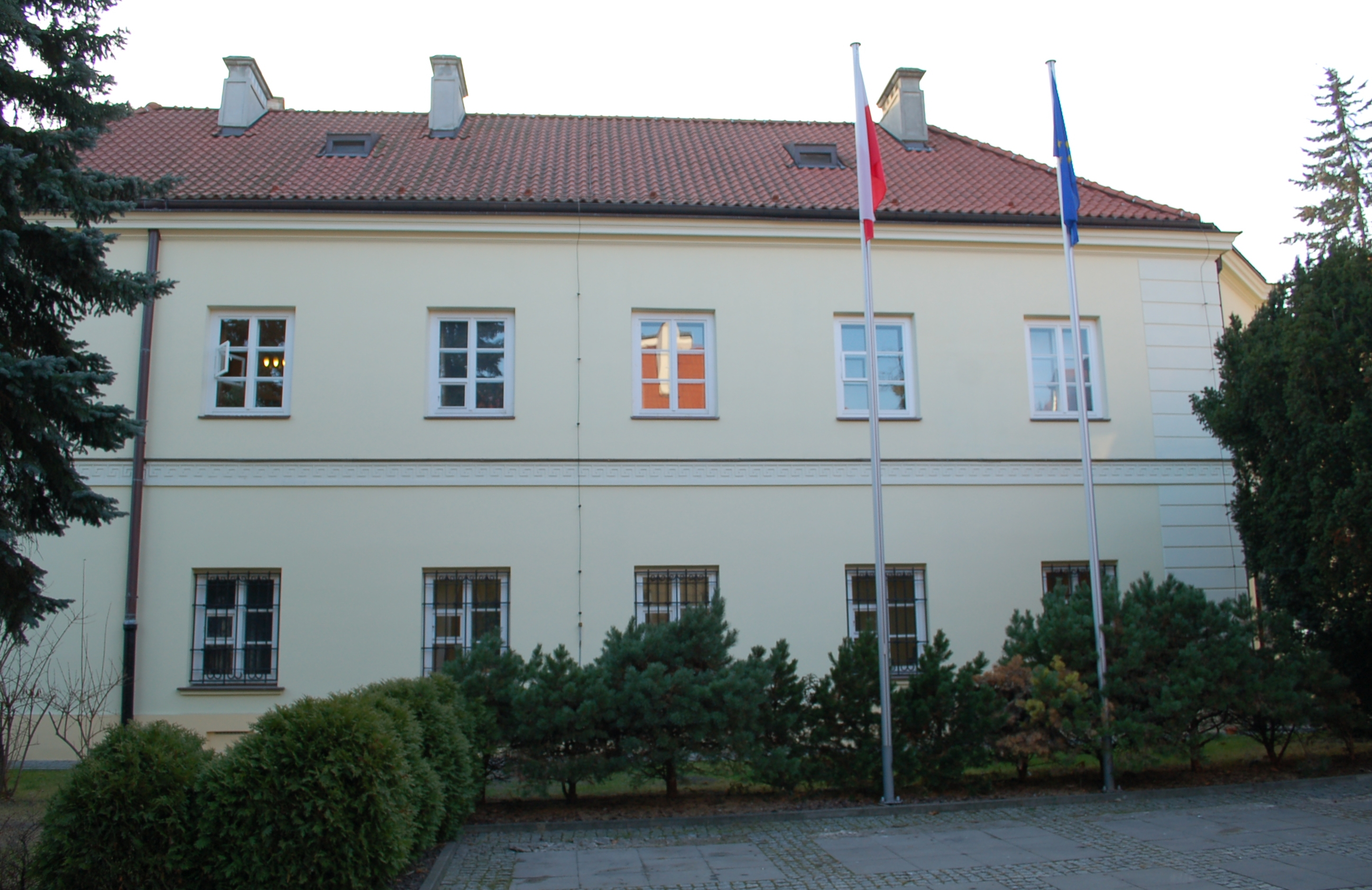 Długa 26, Warschau